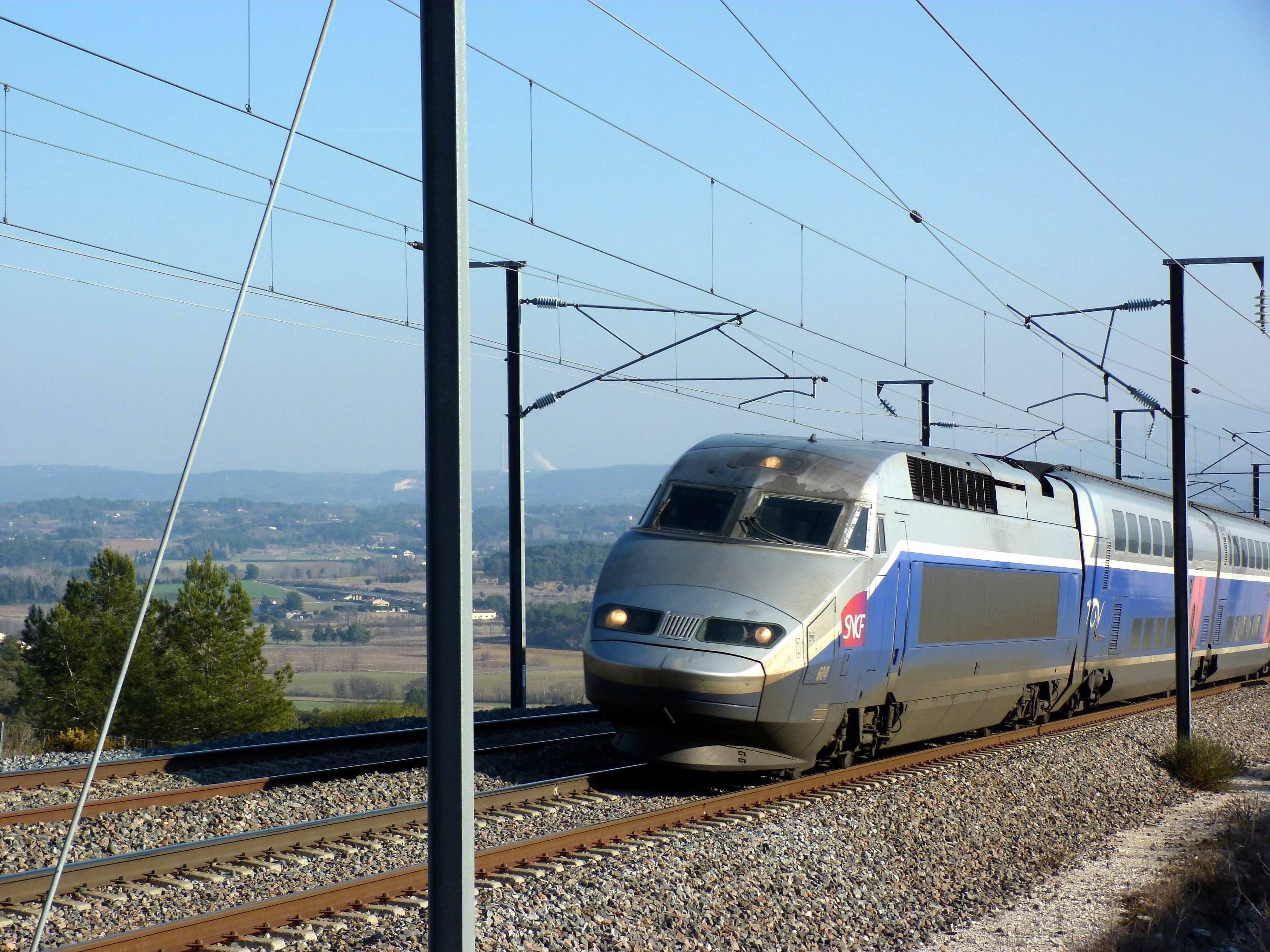 TGV Réseau Duplex n°604 sur voie paire à la sortie du viaduc de Ventabren.